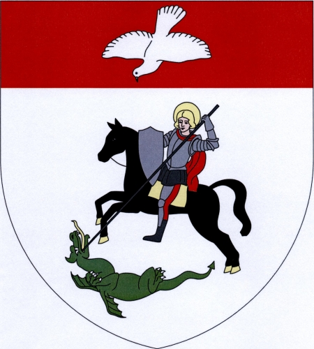 znak, Dolní Čermná, okres Ústí nad Orlicí